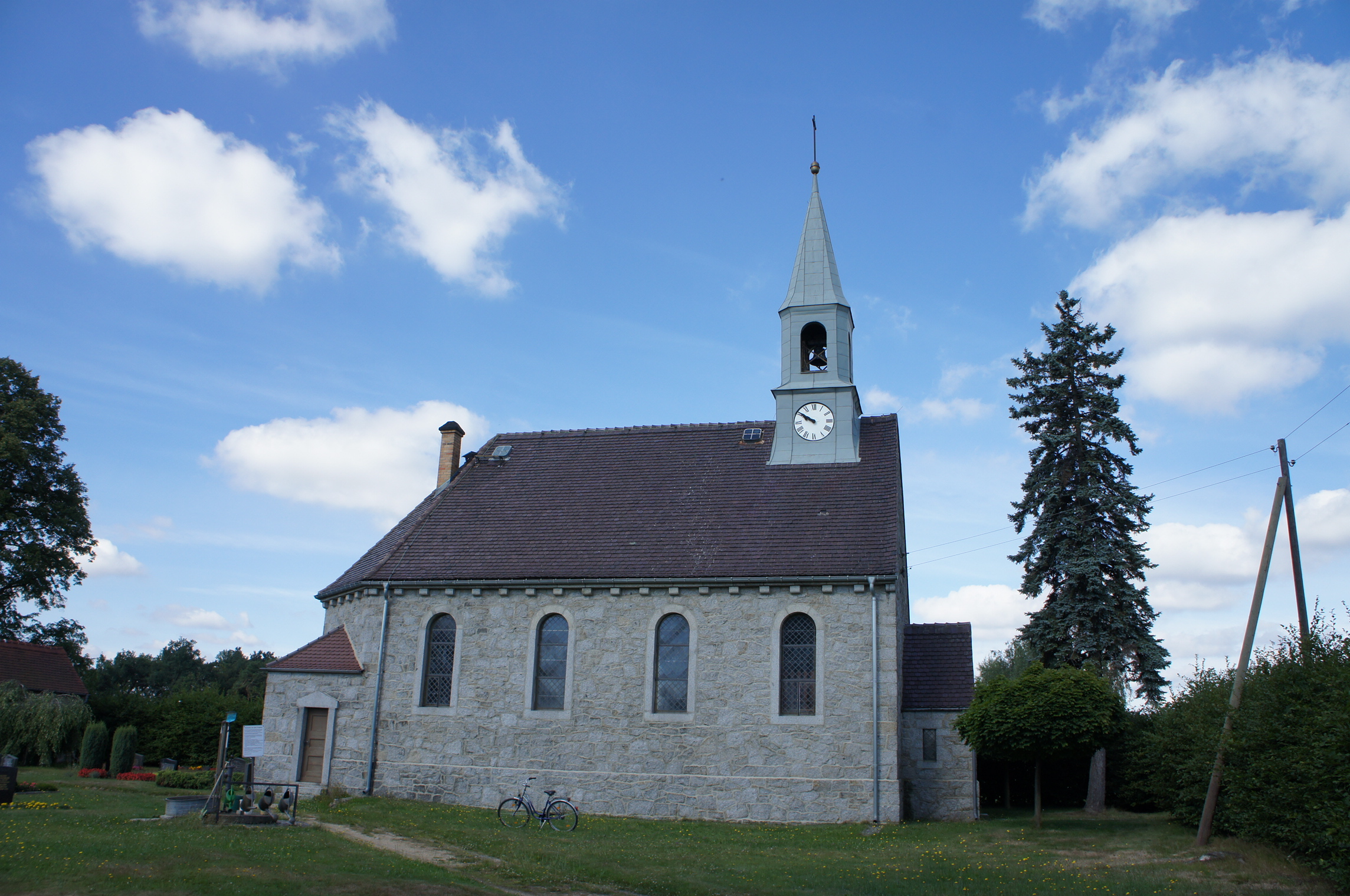 Kapelle Saritsch, 1907